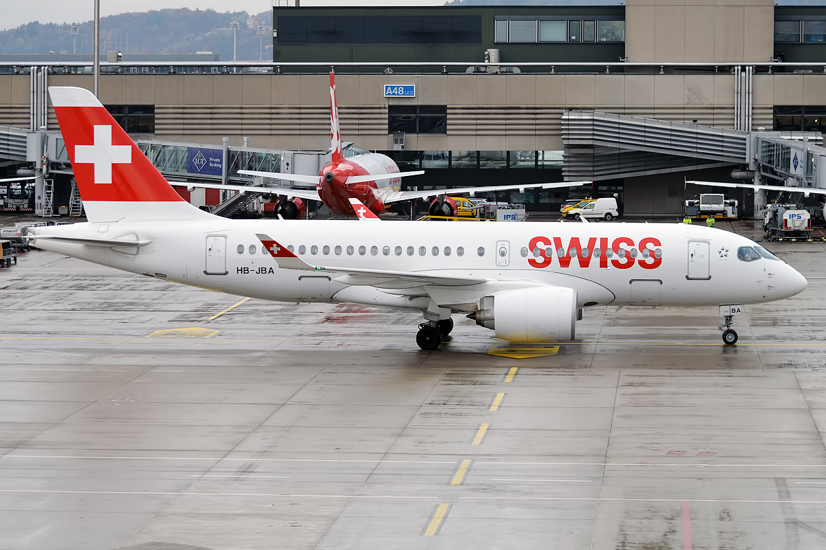 Swiss, HB-JBA, Bombardier CS100